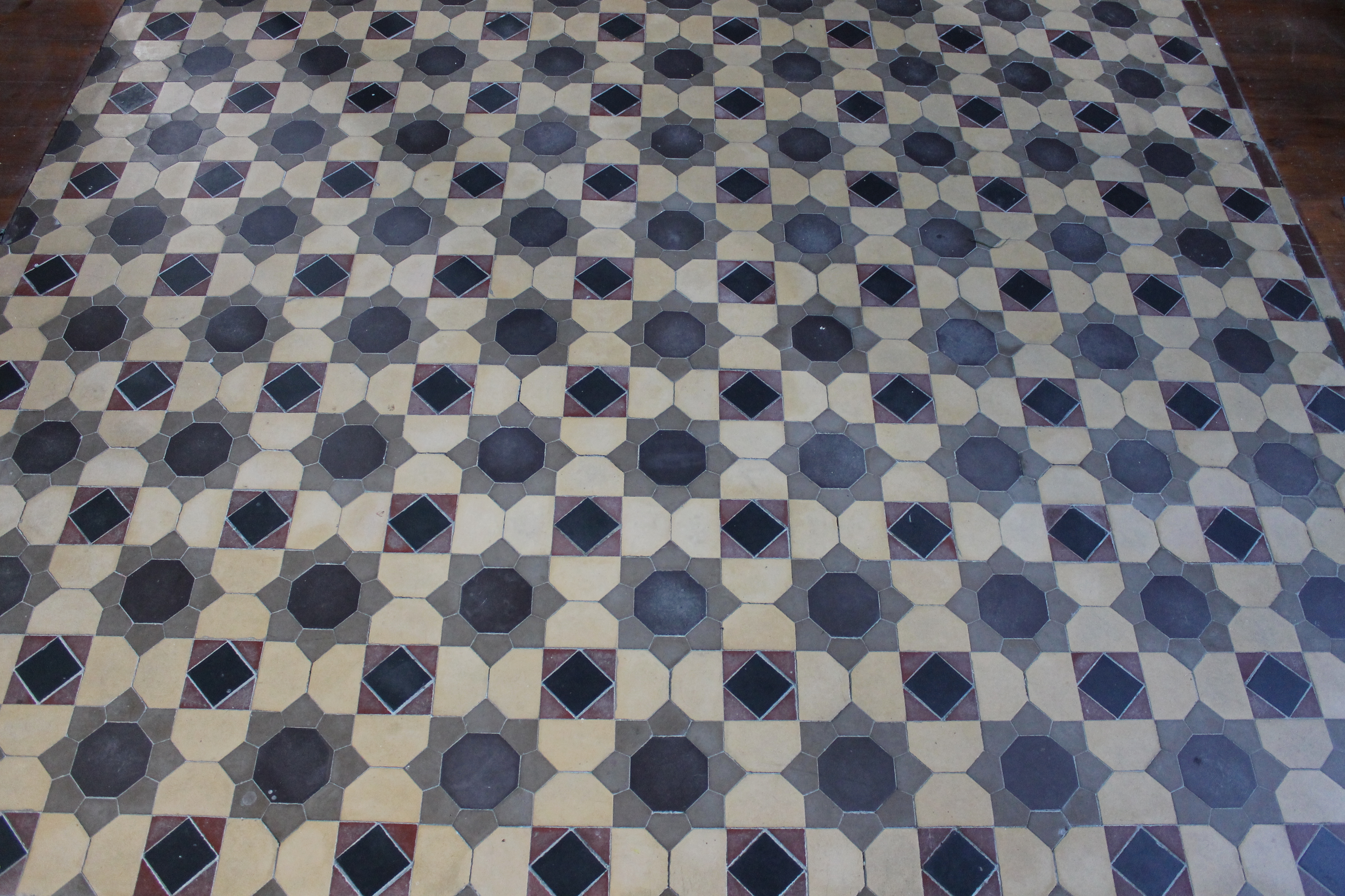 Teils llawr Eglwys y Santes Fair Beddgelert, Gwynedd.